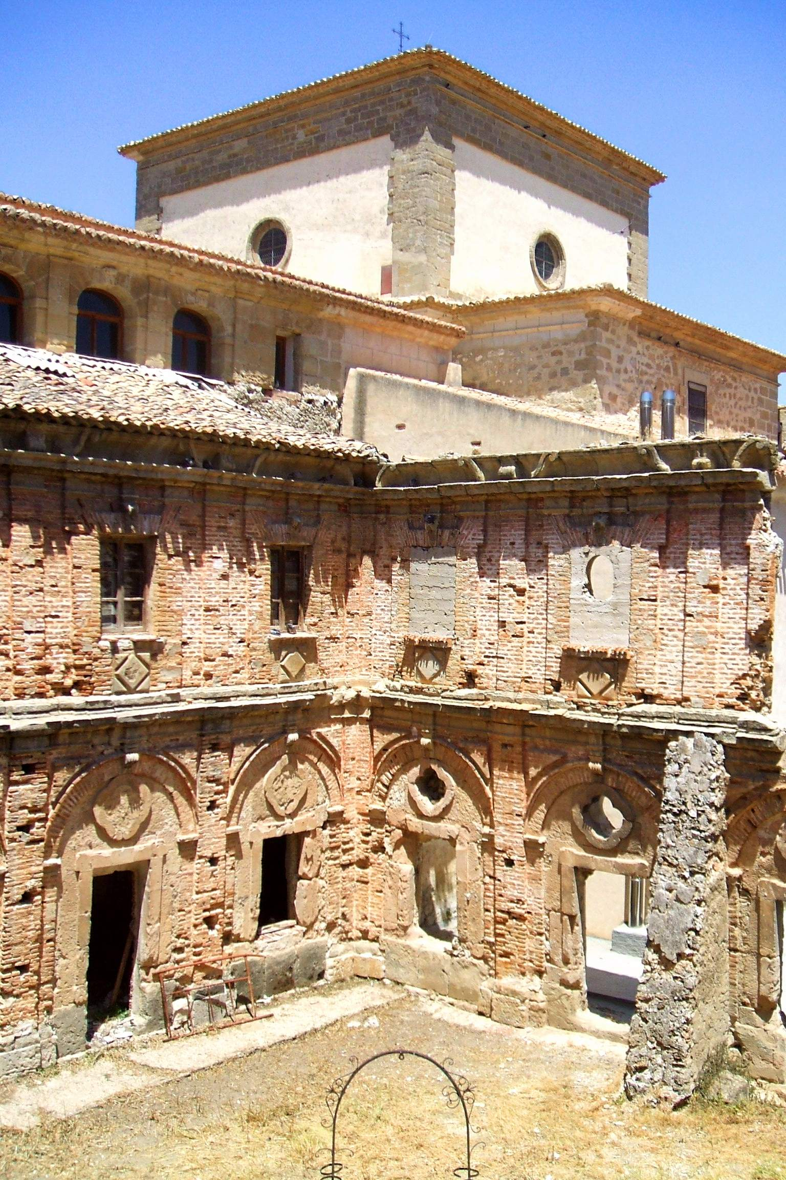 Huete - Monasterio de Santa Maria de la Merced